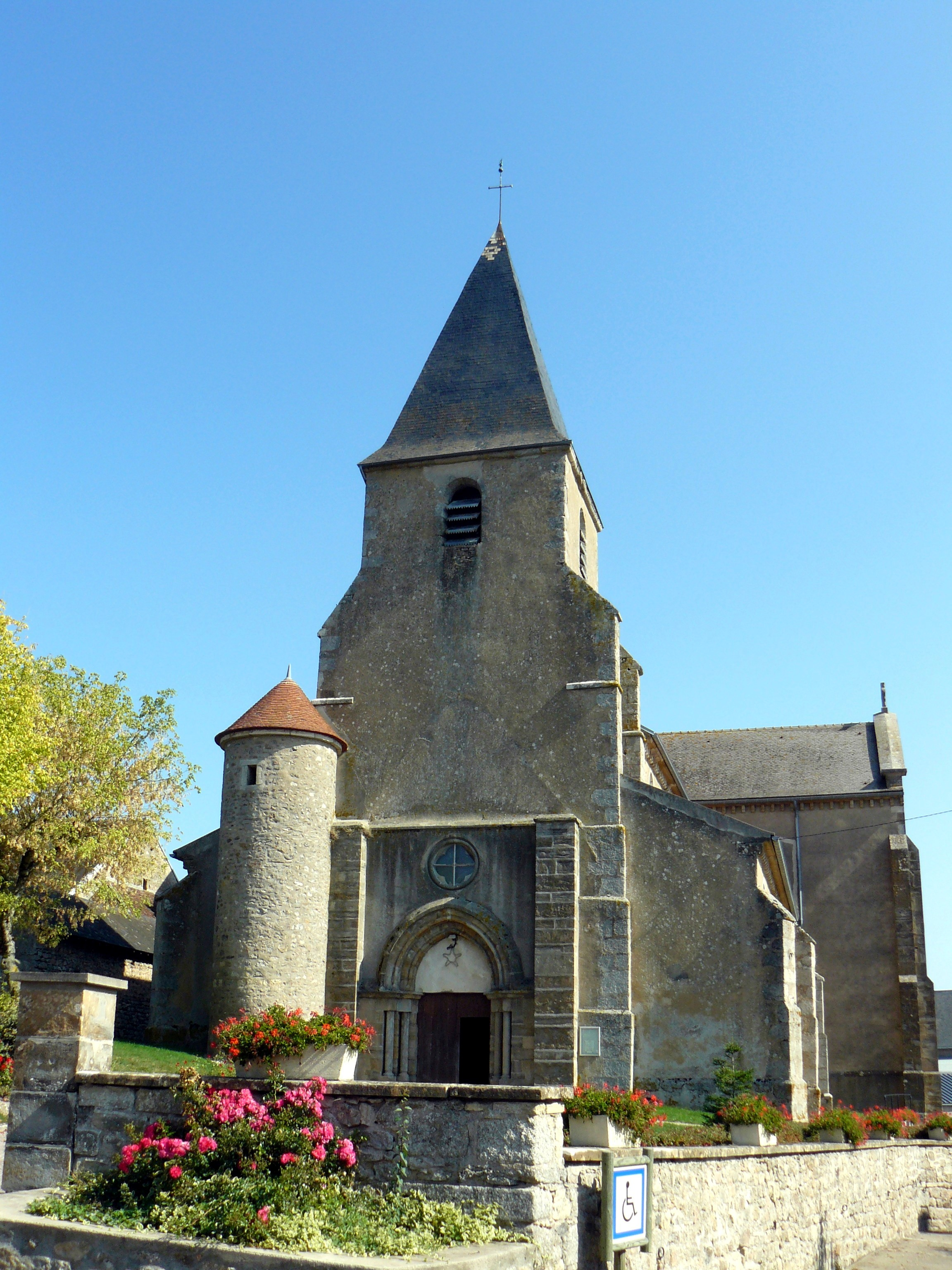 Eglise de Saint-Germain-des-Champs (Yonne, France)